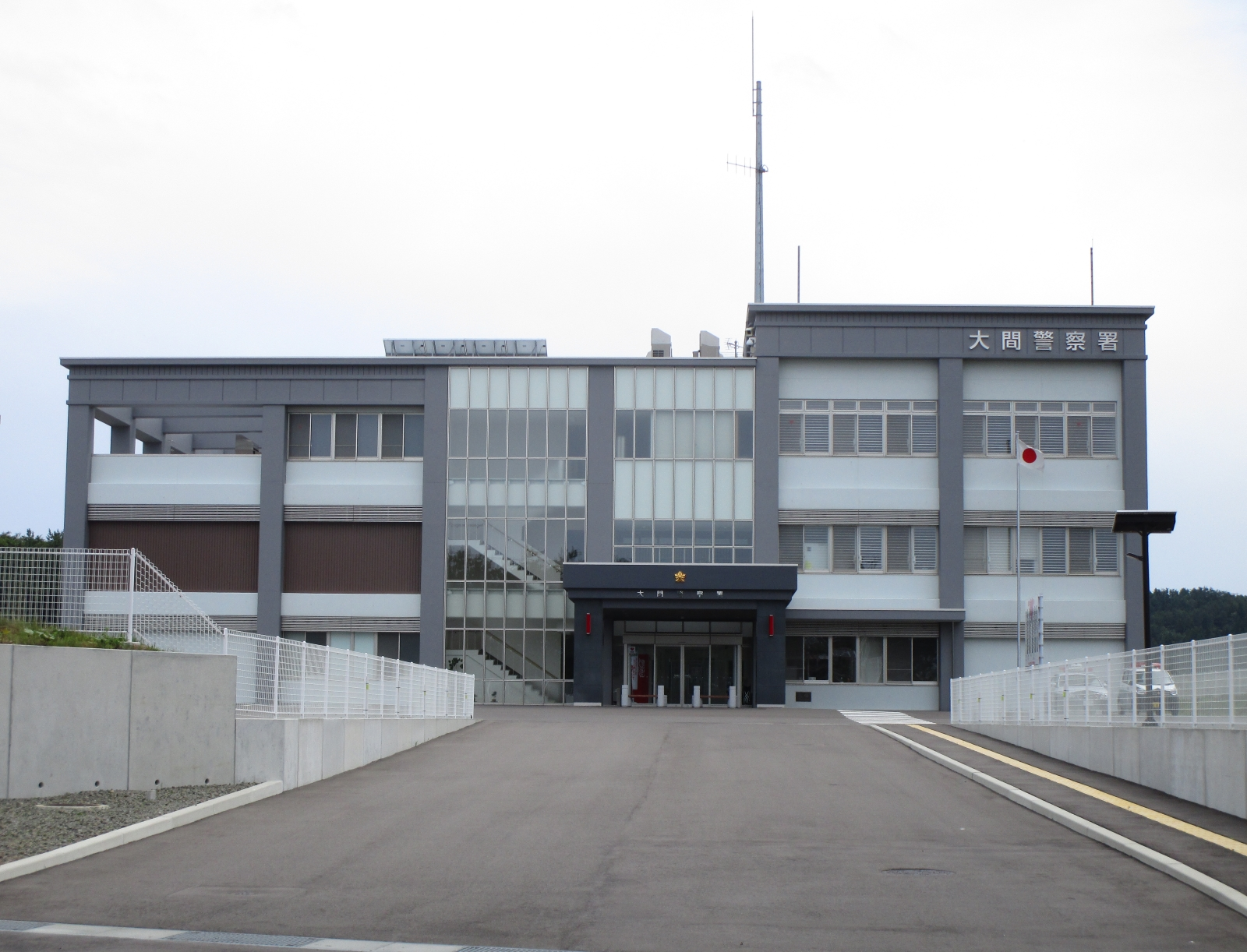 大間警察署（青森県下北郡大間町）